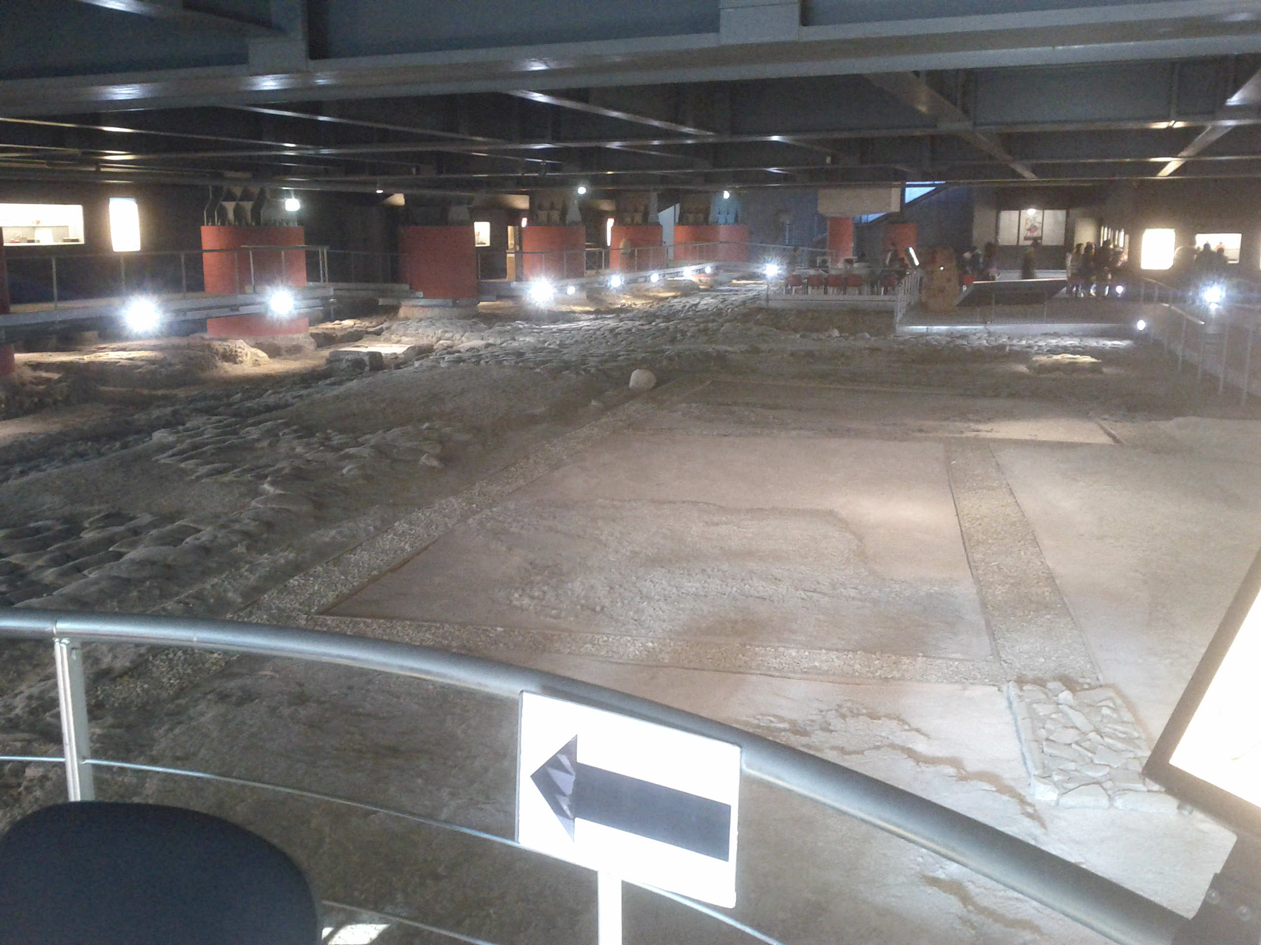 Area archeologica la Fenice di Senigallia - 20120121